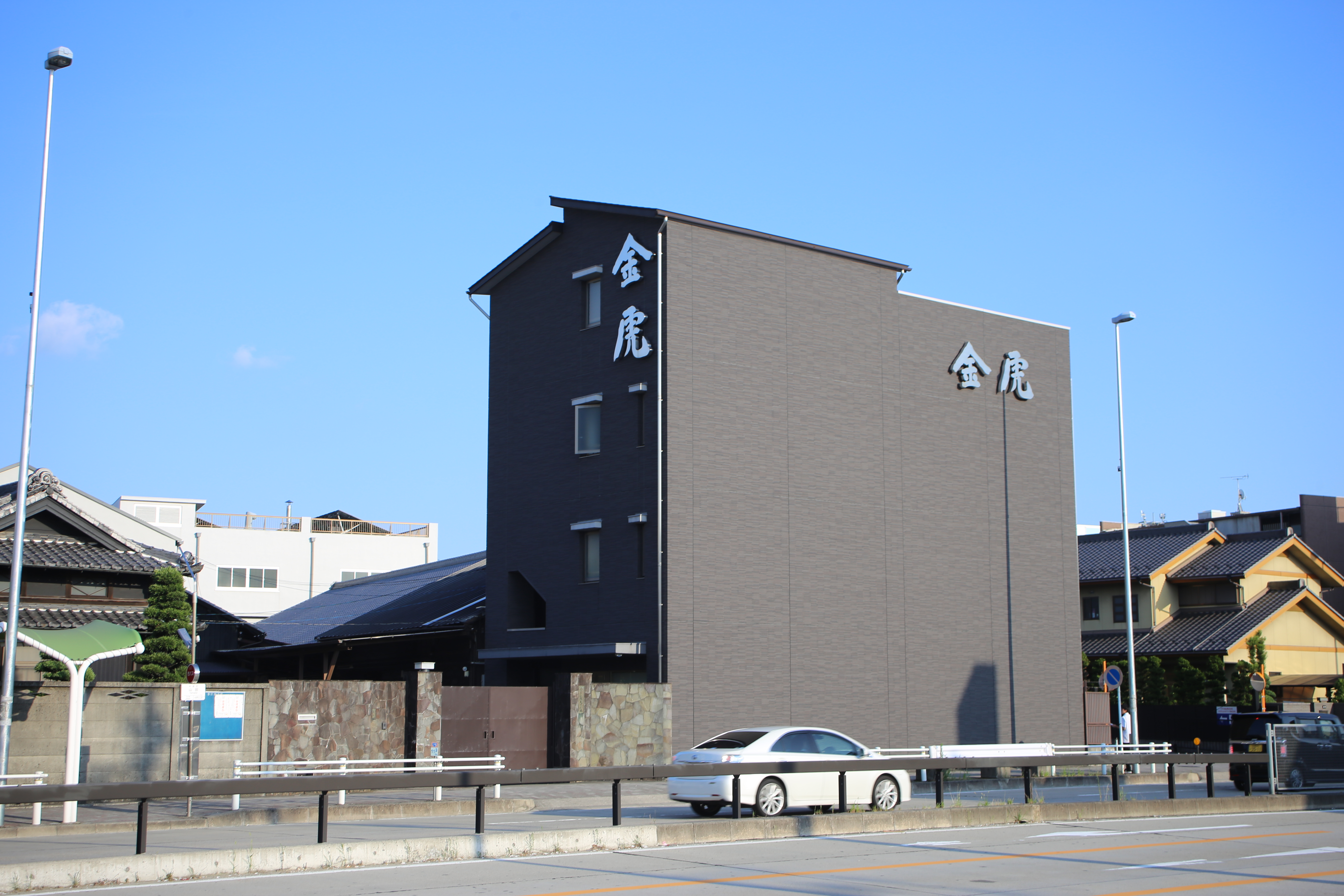 名古屋市北区山田の金虎酒造